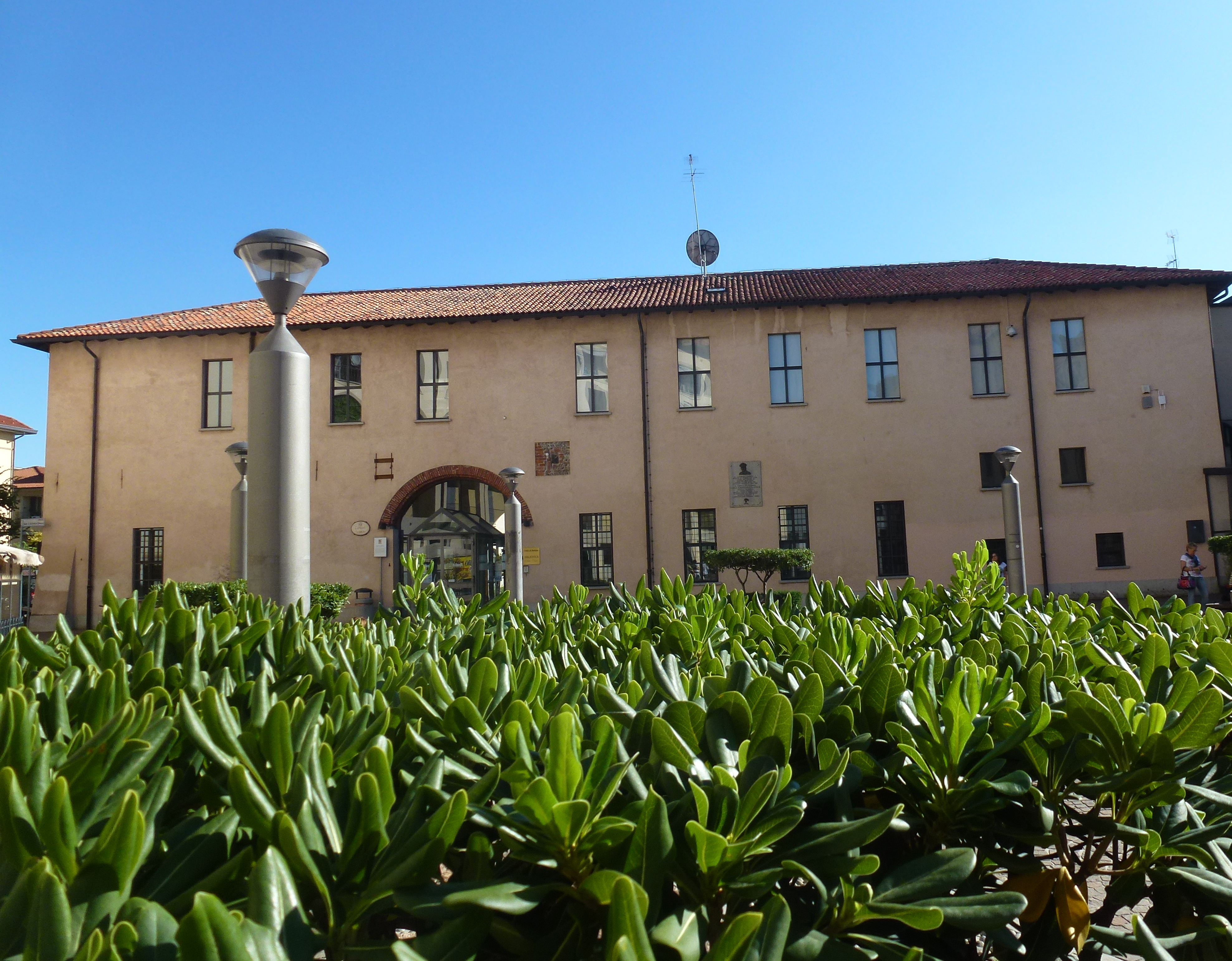 Palazzo Seccoborella - Biblioteca Comunale facciata This is a photo of a monument which is part of cultural heritage of Italy.